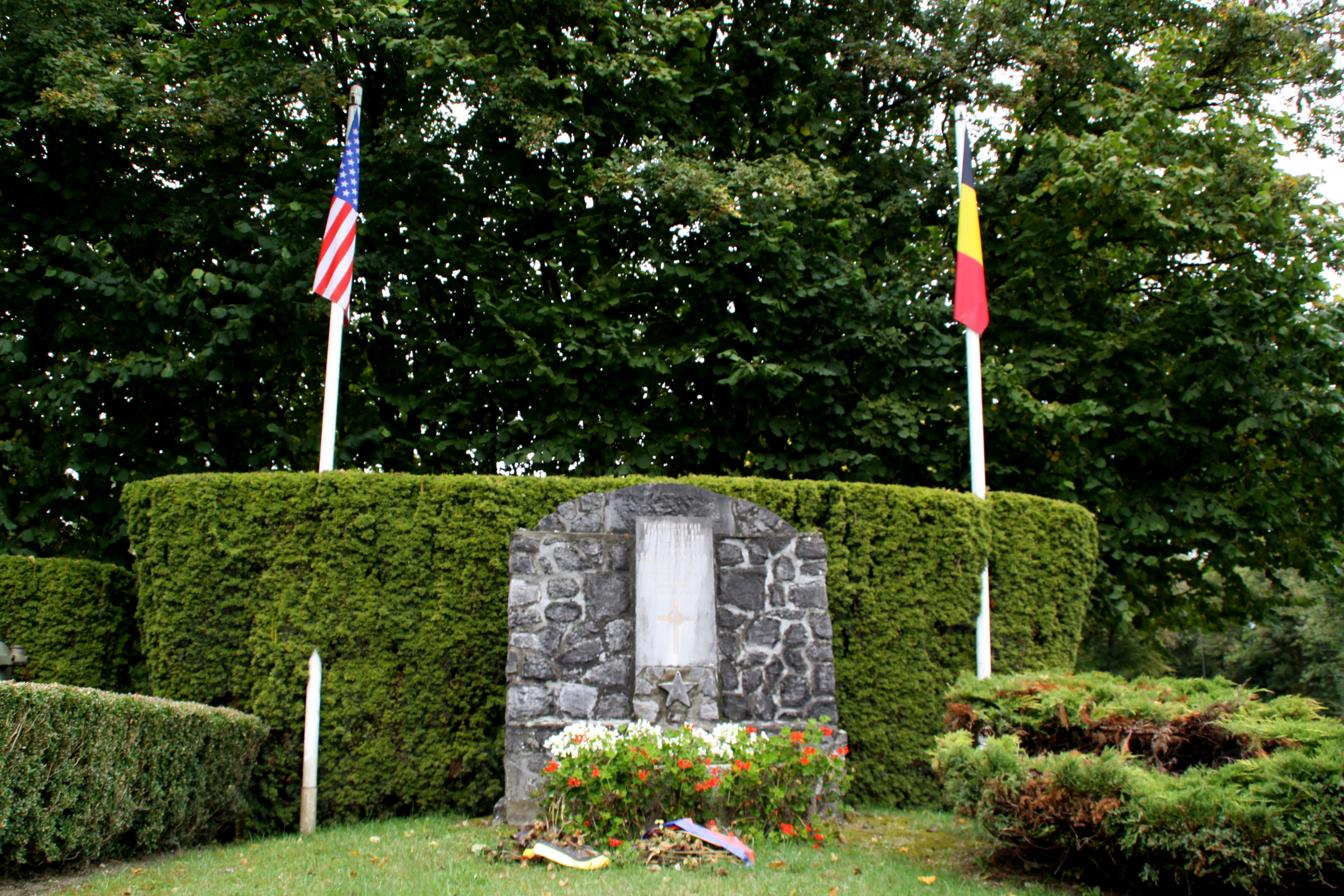 Ernest Glessener Monument zu Baaschtnech